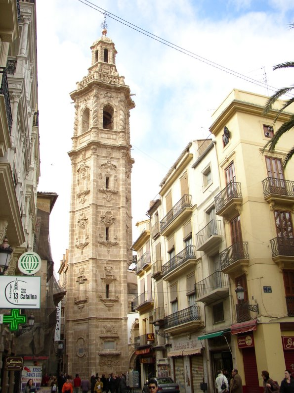 Valencia (Comunidad Valenciana), España. Valencia. Iglesia de Santa Catalina. Fotografía realizada el 22 febrero de 2003 por el autor Usuario. Pelayo2.